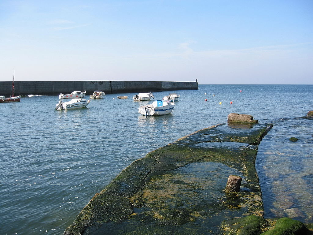 La plage de Batz sur Mer, Photo prise par Harrieta171 le 06/09/04